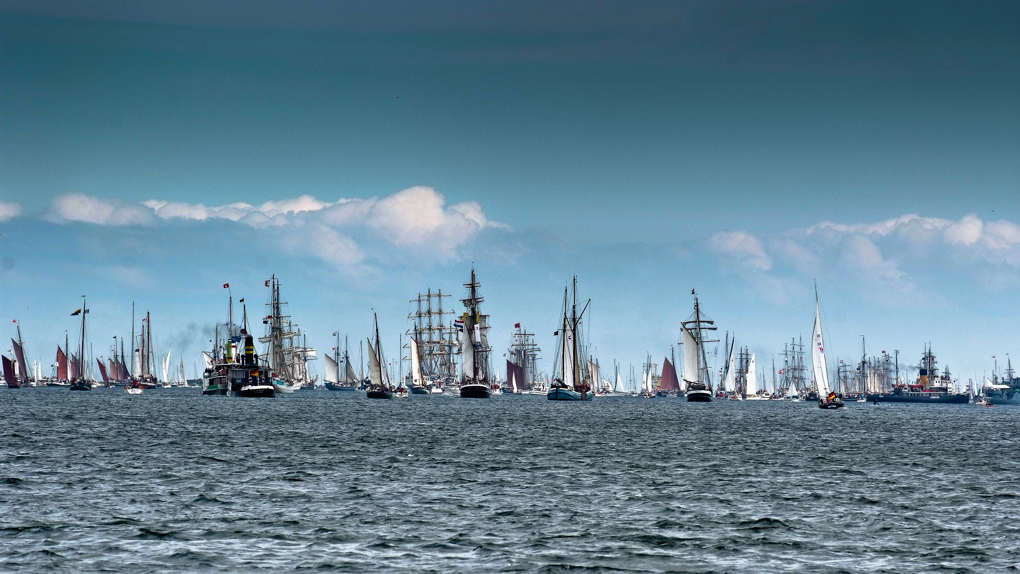 Windjammerparade auf der Kieler Woche 2009